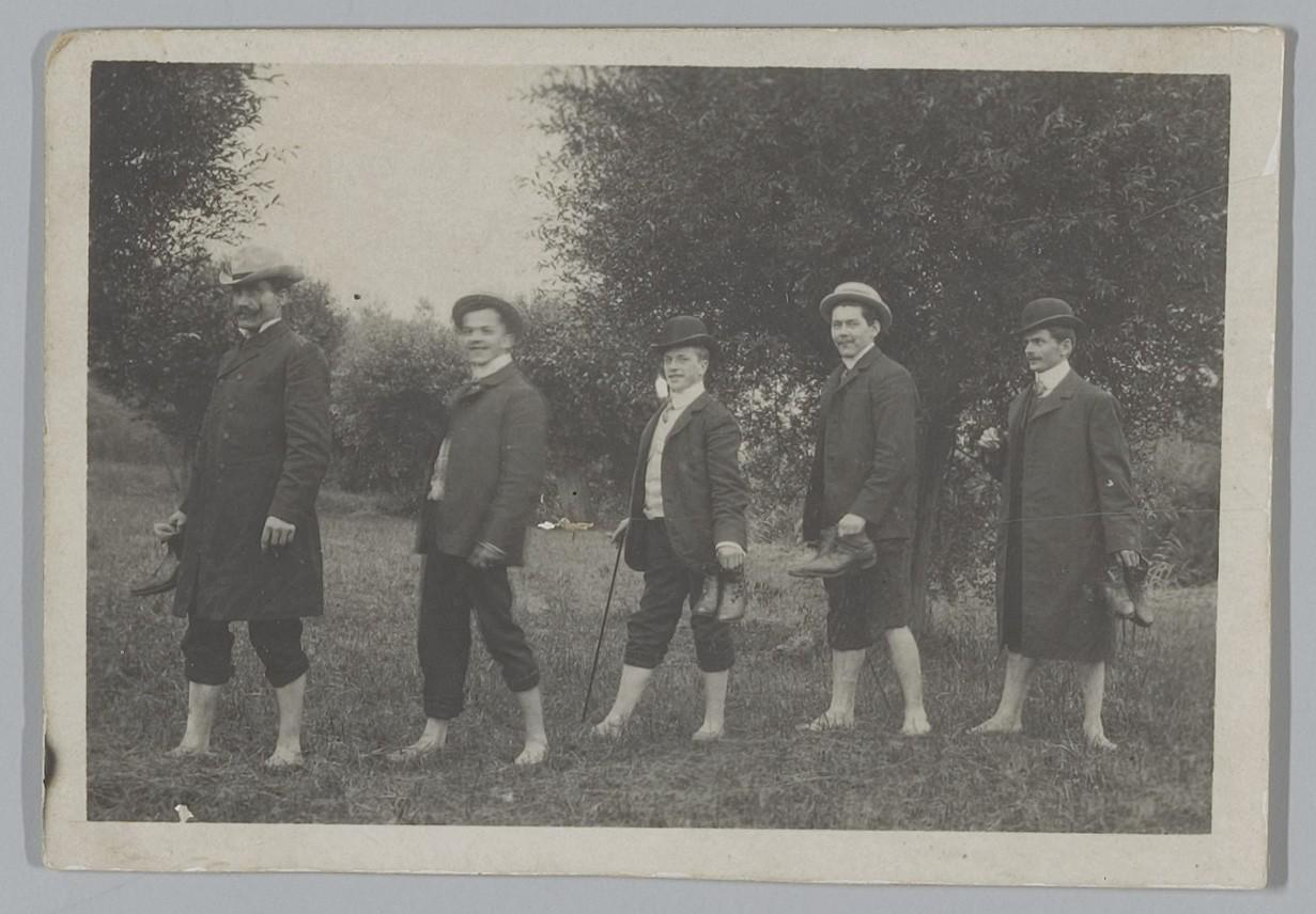 Beschrijving Dauwtrappen door de heren van het effectenkantoor H.J. van Ogtrop, met links H.J. van Ogtrop (1866-1914) Documenttype foto Vervaardiger Onbekend Anoniem Collectie Collectie Stadsarchief Amsterdam: foto-afdrukken Datering 1911 Inventarissen Afbeeldingsbestand ANWG00189000001